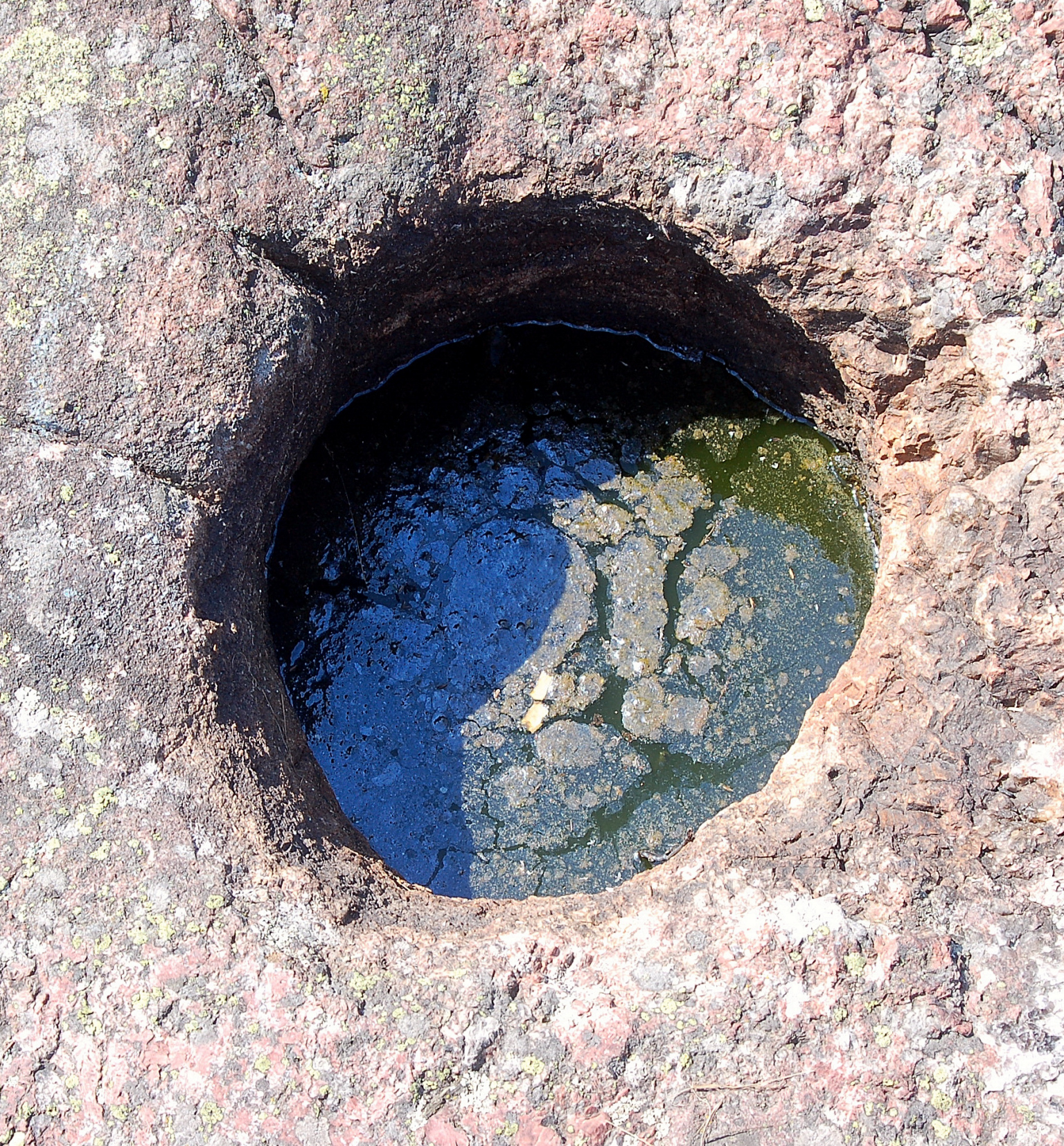 Grytor är en cirkelrund grop i ett berg, eller större sten. En teori är att en ’’löparsten’’ legat i botten och åstadkommit urgröpningarna. St Olofs gryta har en diameter på ca 35 cm